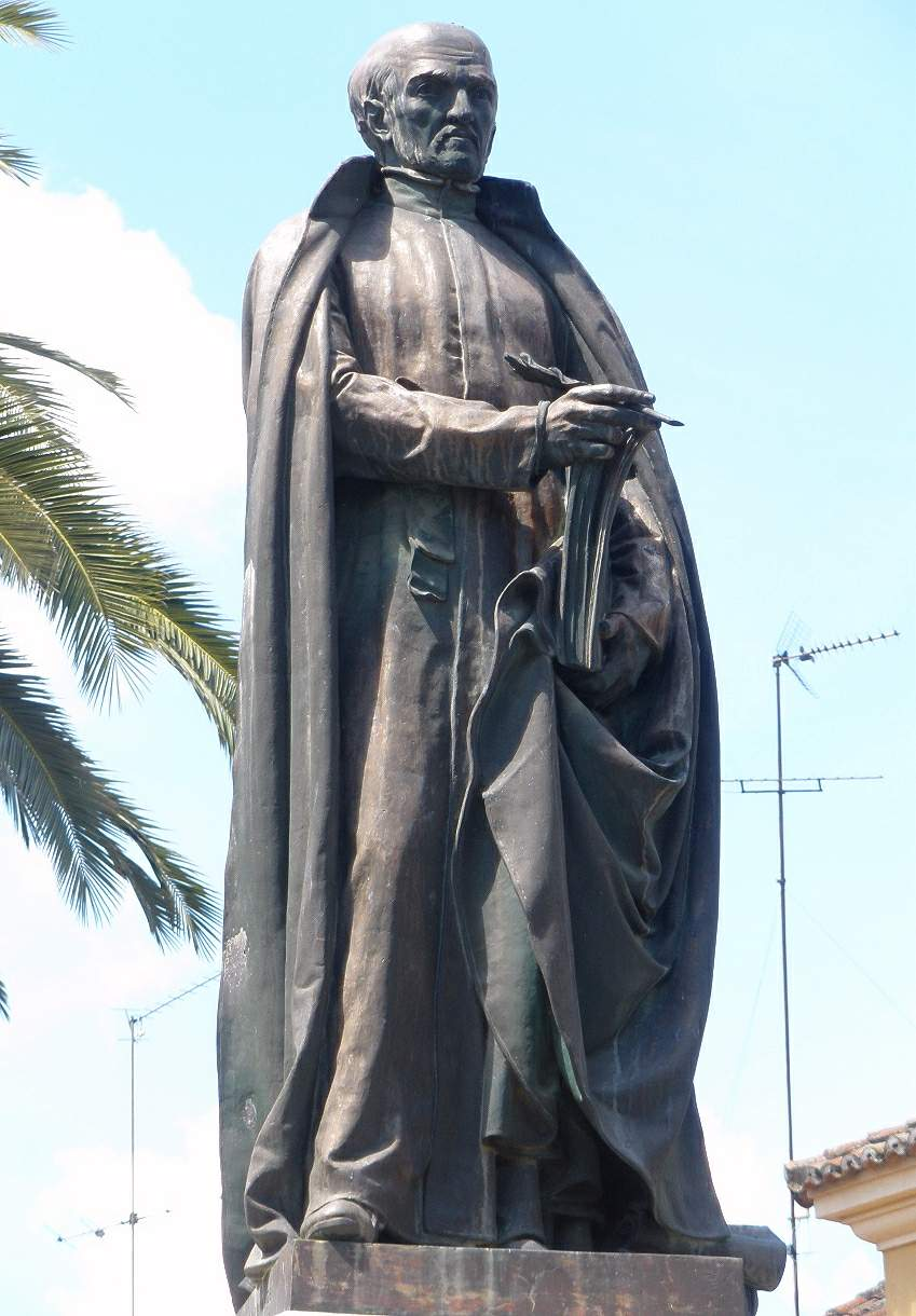 Talavera de la Reina - Monumento a Juan de Mariana